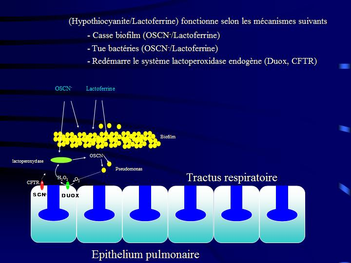 Travail personnel